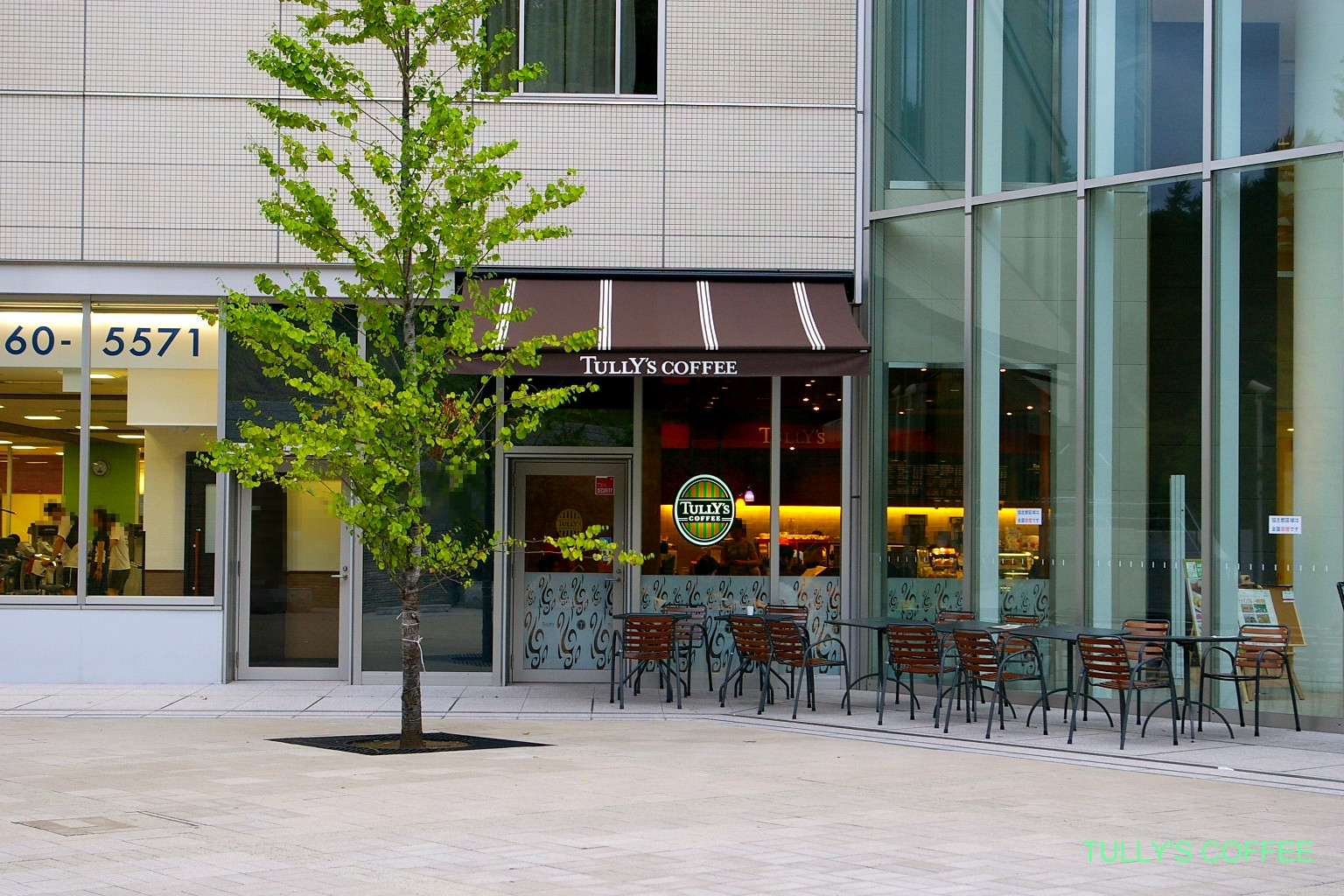 2009.5日本国内で塾生 (talk)が撮影。